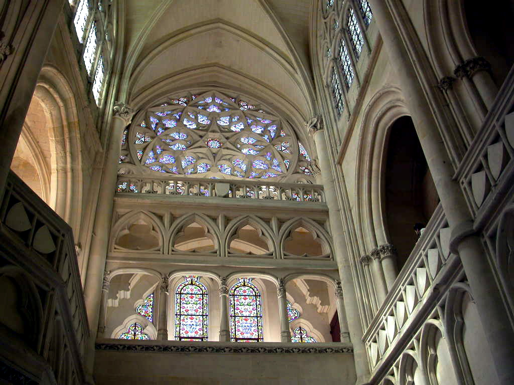 Chateau de Pierrefonds , Oise, France